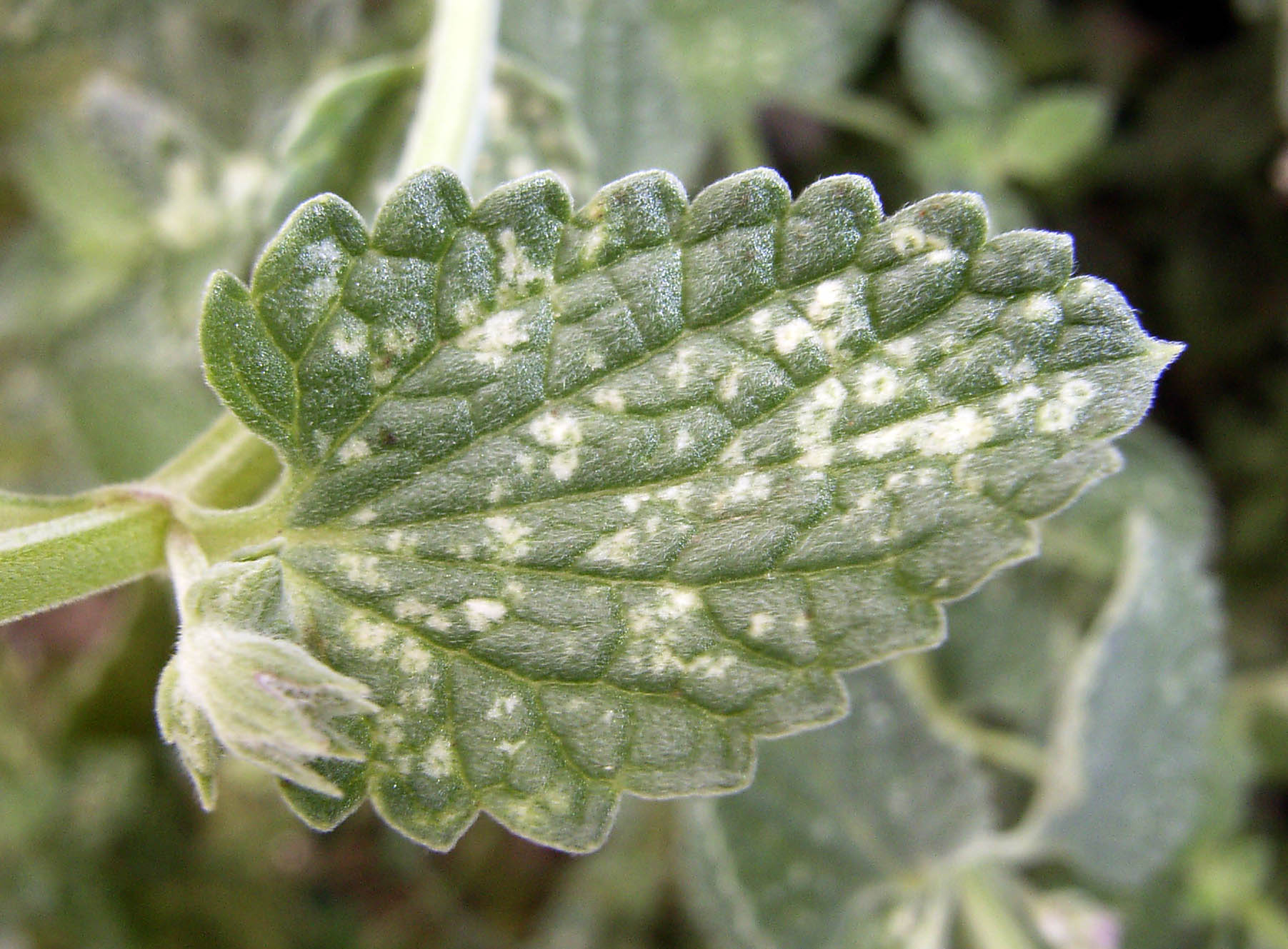 Von Blattzikaden verursachtes Saugbild an Katzenminze (Nepeta cataria)